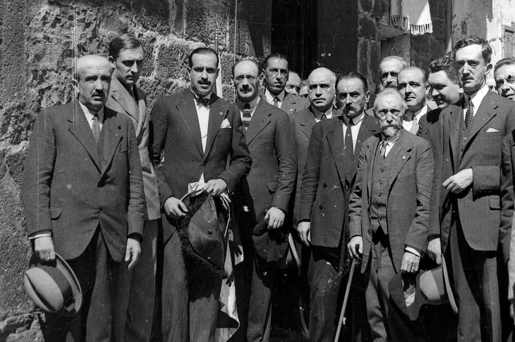 Vergara. 1930. Quinto Congreso de Estudios Vascos de Bergara. Localización: Vergara